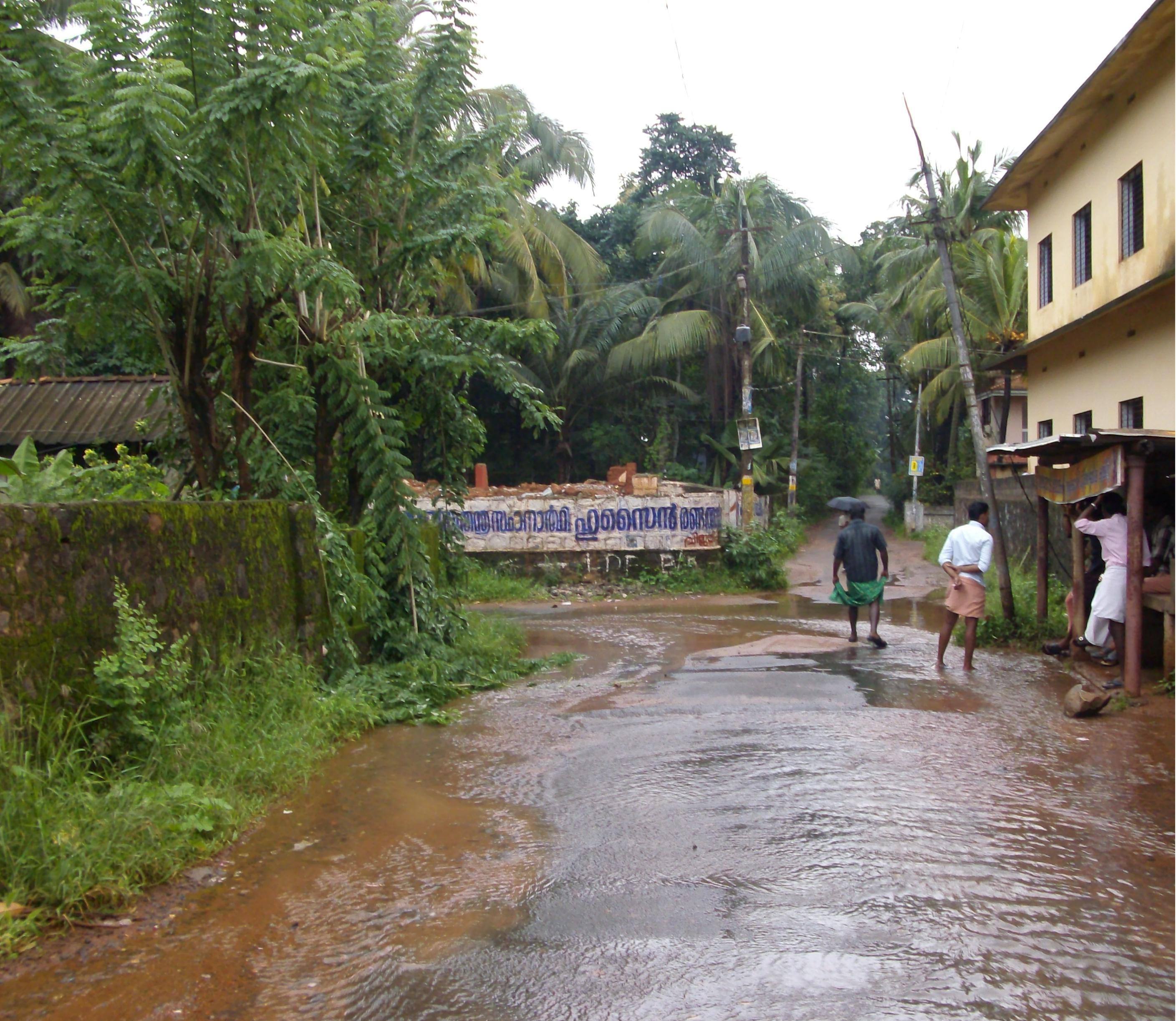 വട്ടേനാട് ഗ്രാമം